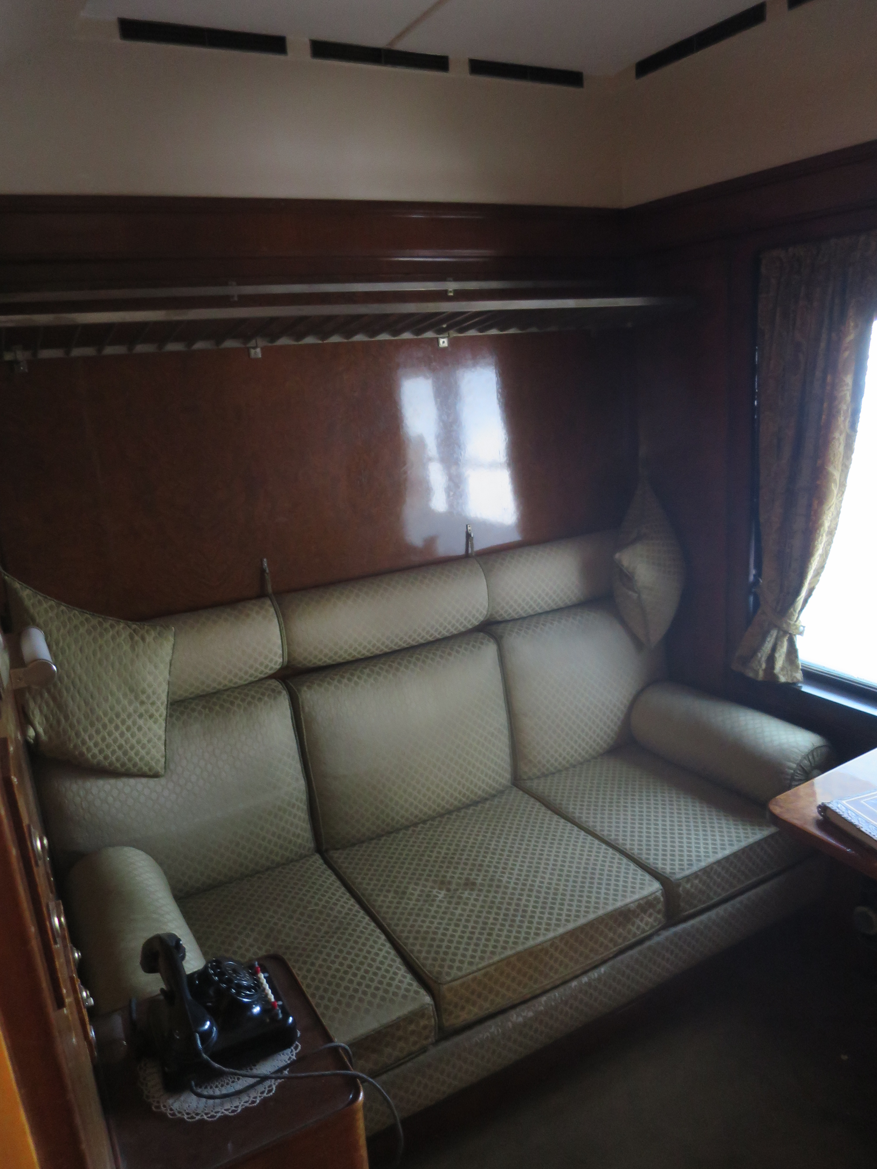 Salonwagen v. Joseph Goebbels, später der des Bundesverkehrsministers